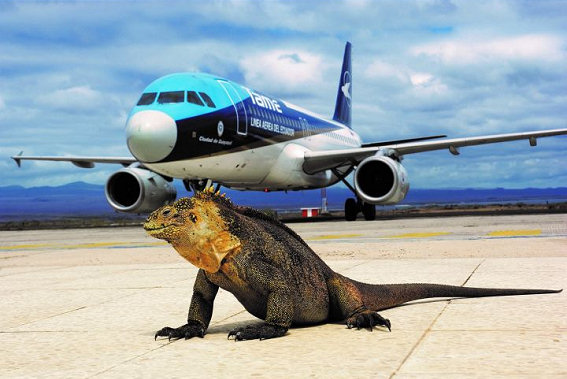 A320 von TAME auf dem Aeropuerto Isla Baltra, Galapagos, Ecuador